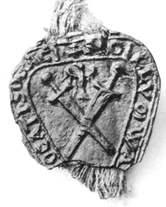 Siegel der Vögte von Soest